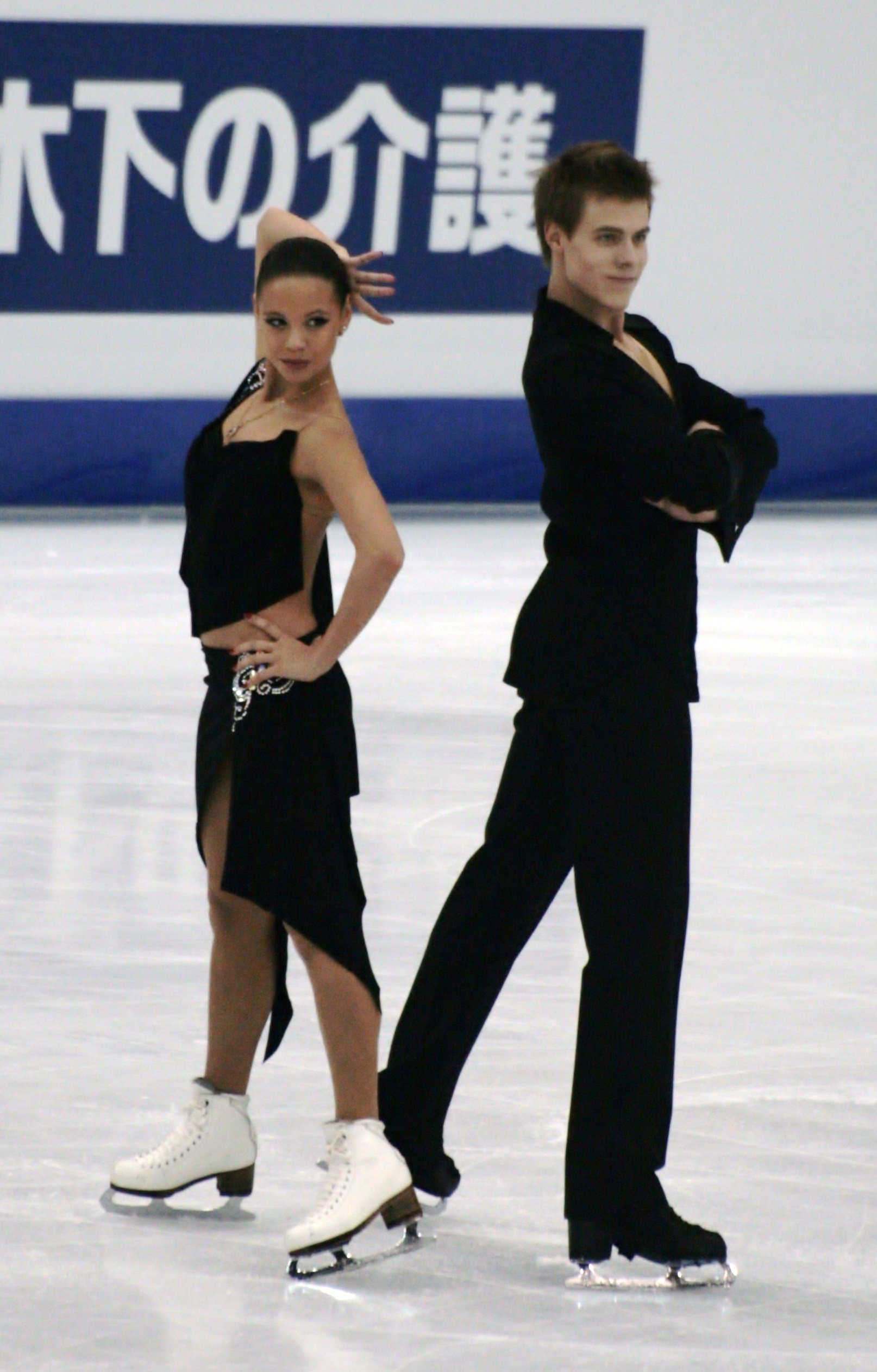 Елена Ильиных и Никита Кацалапов (Россия) на чемпионате мира по фигурному катанию 2012